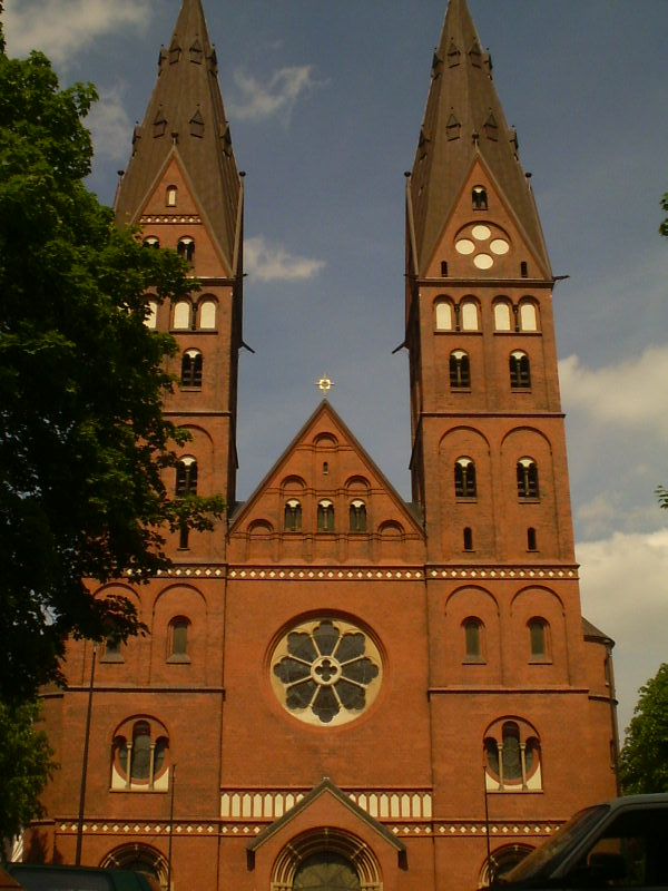 Die katholische Pfarrkirche St. Marien steht in St. Georg und ist seit 1995 Sitz des Erzbischofs von Hamburg. Kirchenbau in neo-romanischem Stil.